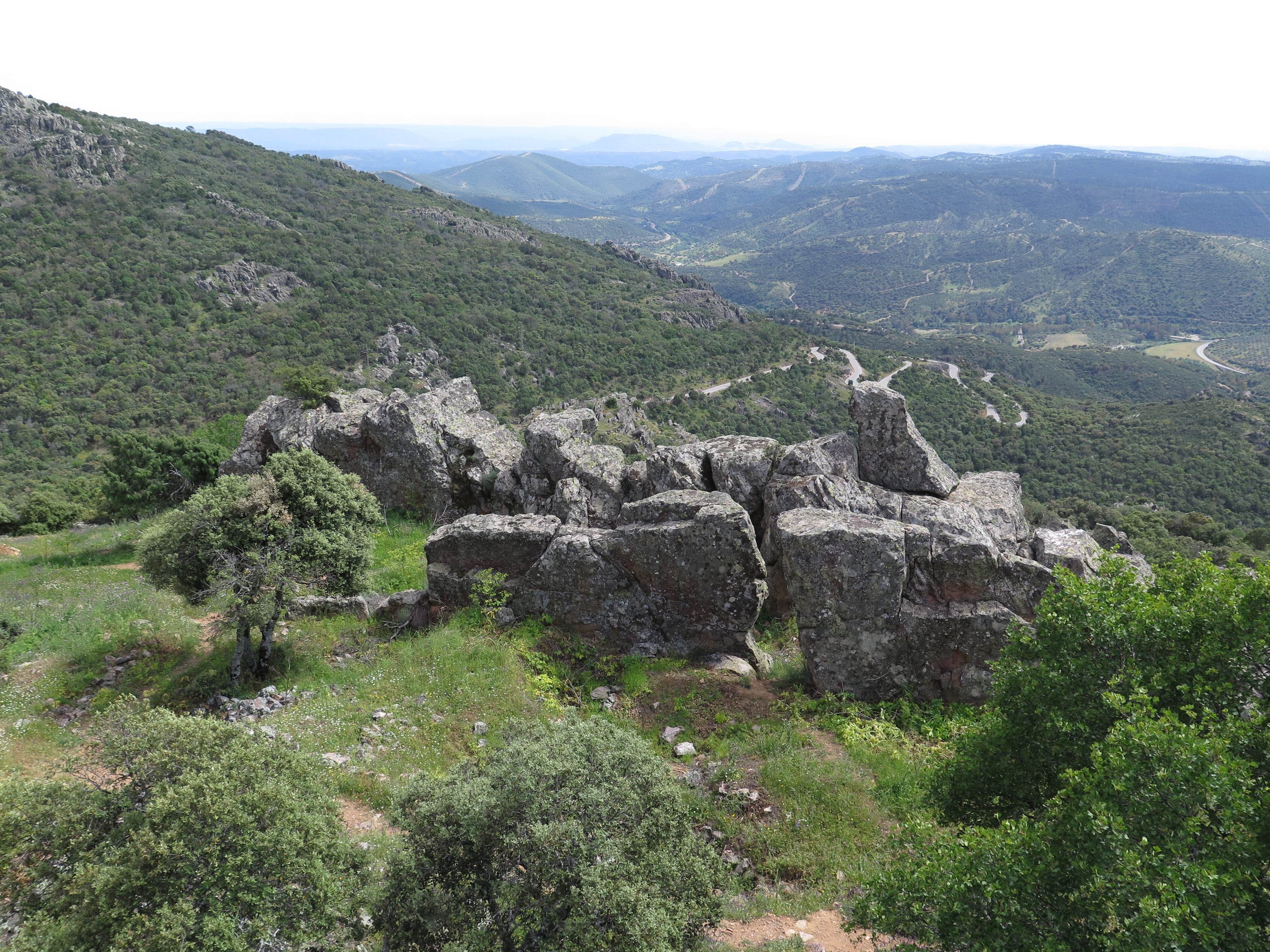 Vista general del Parque Natural de Despeñaperros.